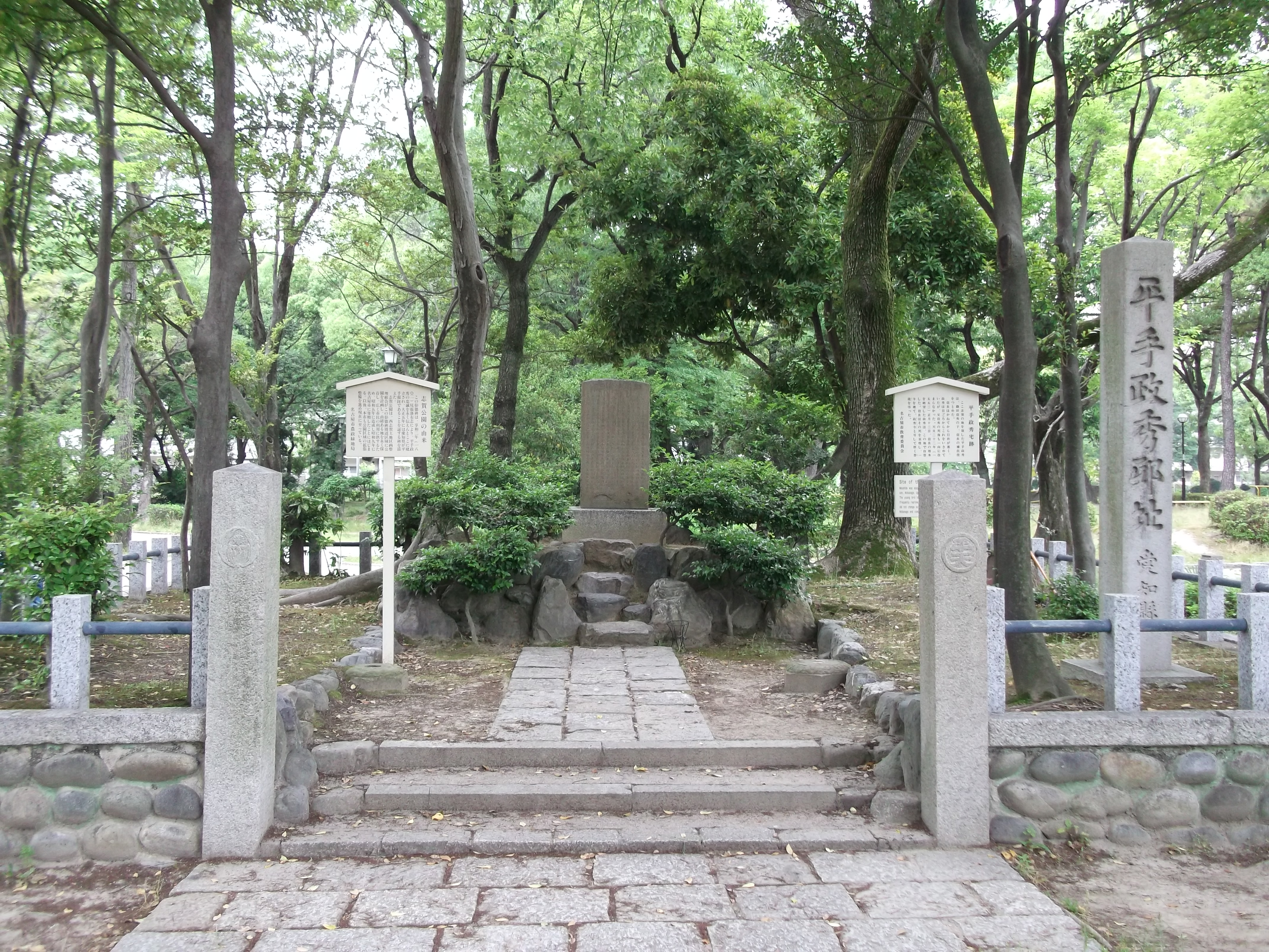 名古屋市北区志賀公園内にある平手政秀邸宅跡碑